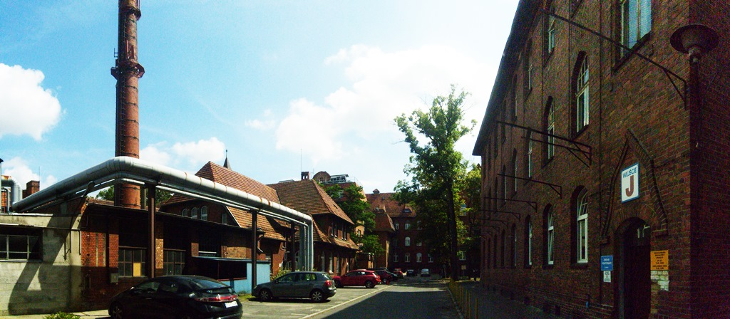 Poznań, Szpital im. H. Święcickiego; widok na jedną z alejek, wejście J